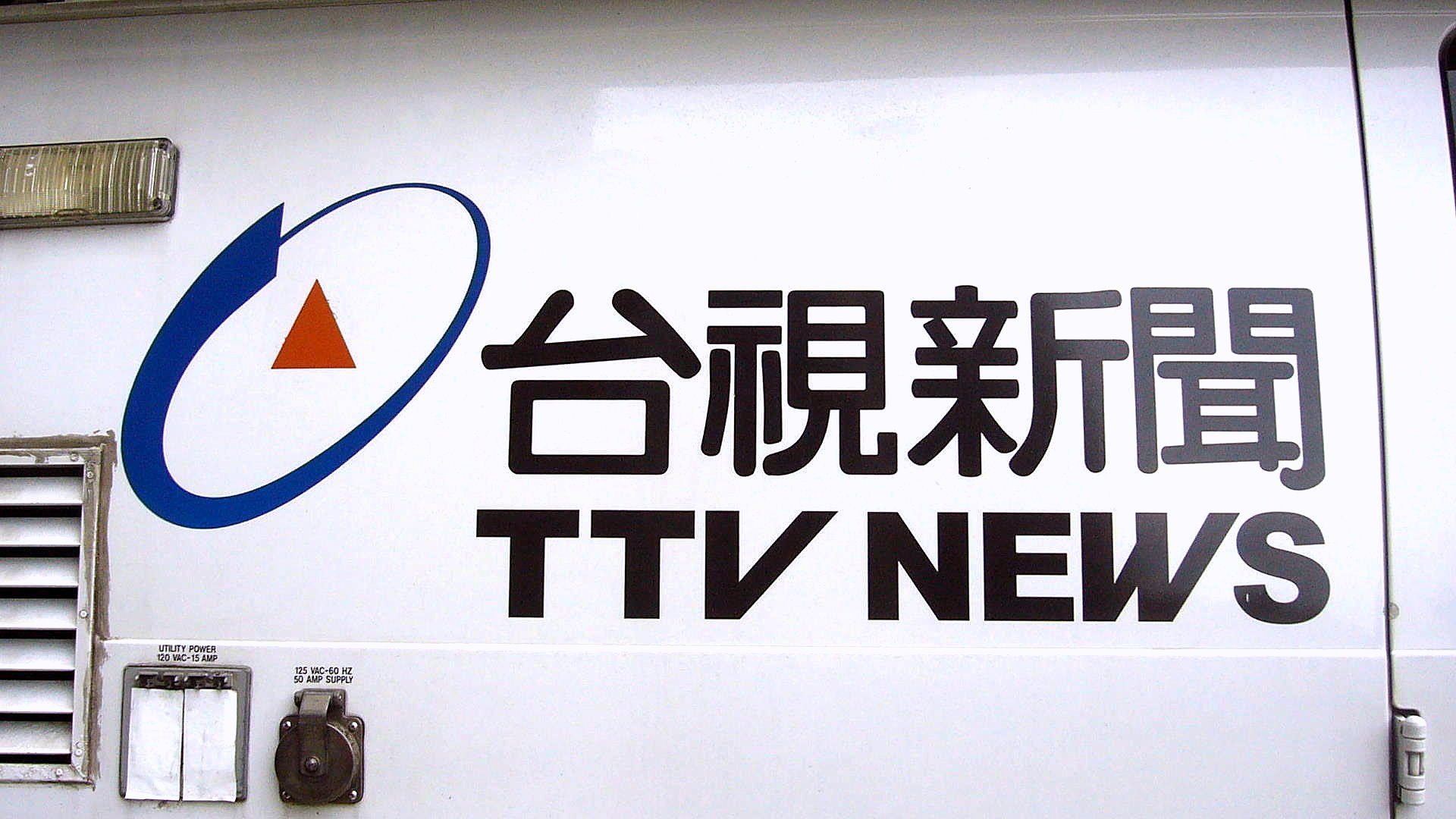 台視新聞SNG車BQ-978右側，臺灣電視公司第二代企業識別標誌與台視新聞標準字。